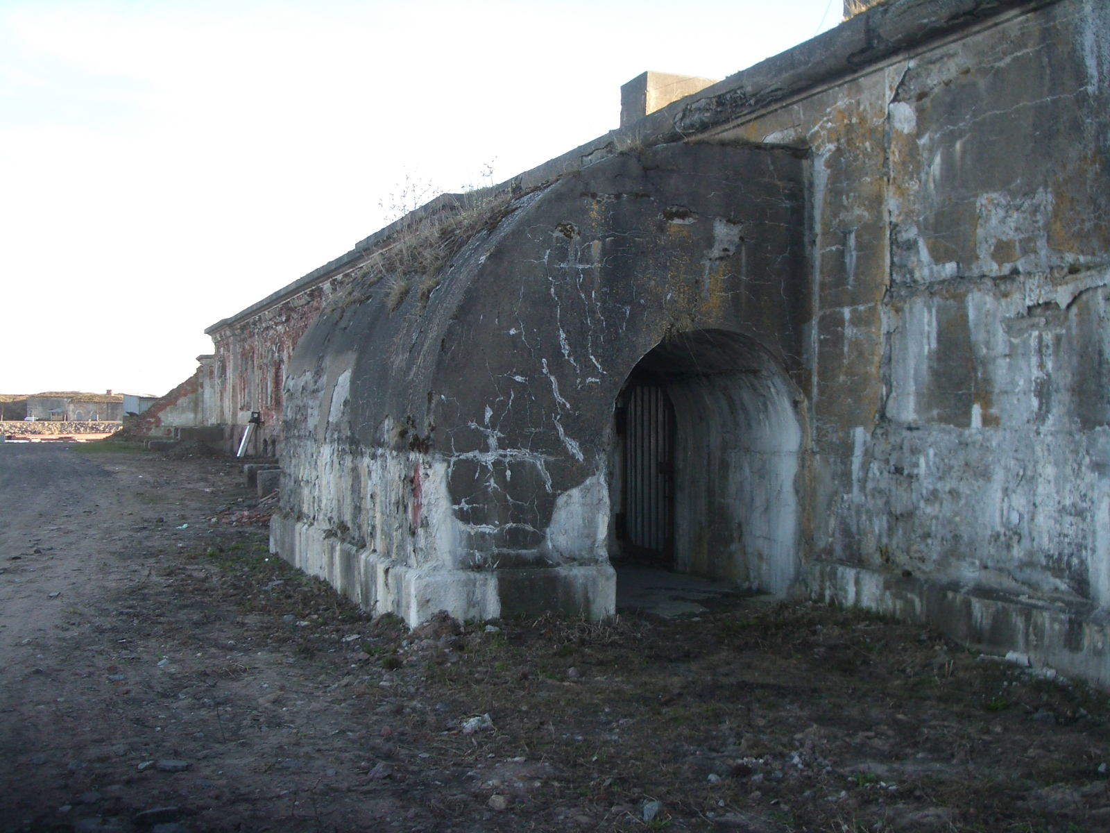 Сквозник округлой формы